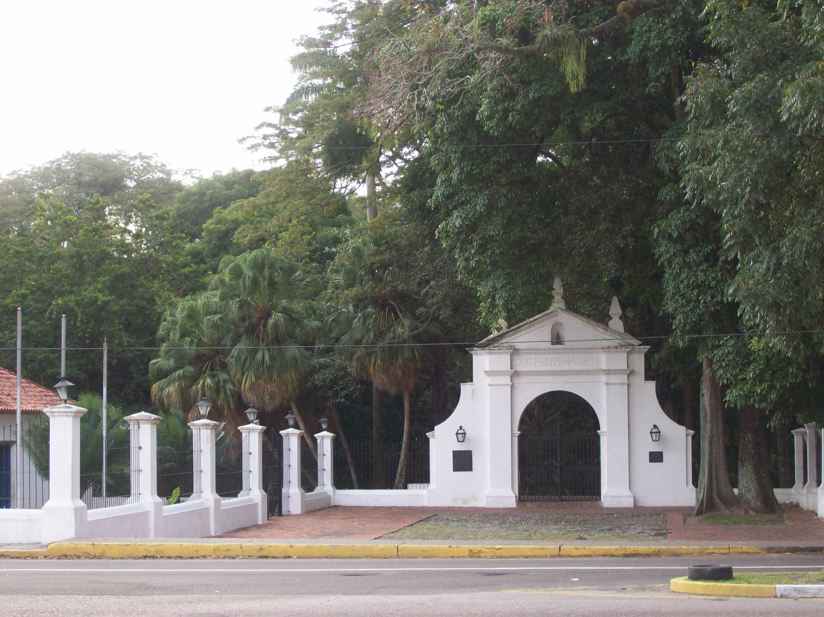 Parque San Felipe El Fuerte